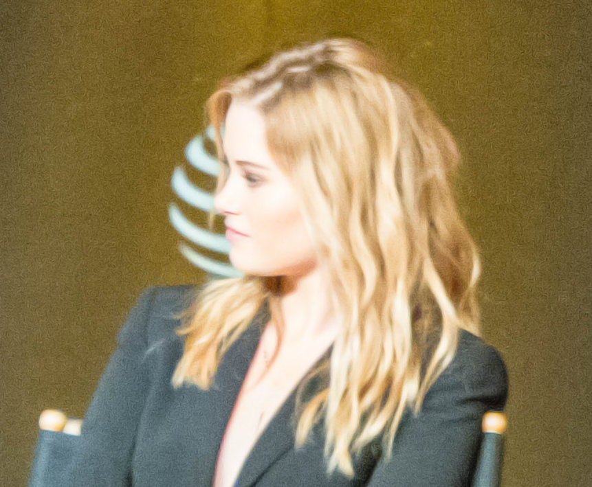 Virginia Gardner